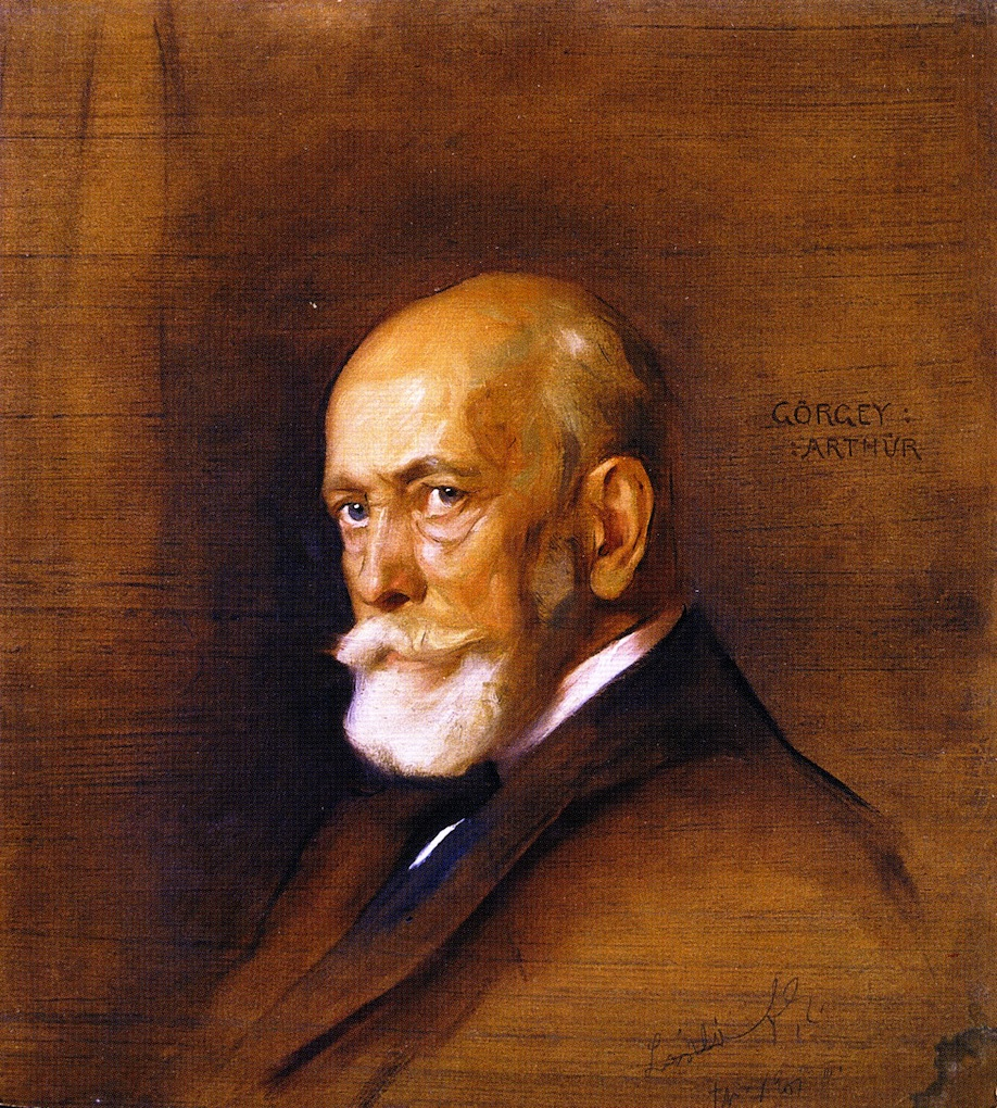 Görgey Artúr portré, László Fülöp festménye